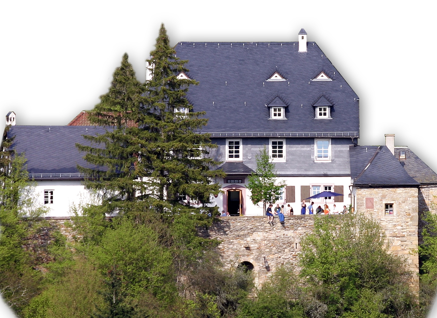 Schullandheim Winterburg - Gebäude des alten Amtshauses in der Gemeinde Winterburg im Soonwald